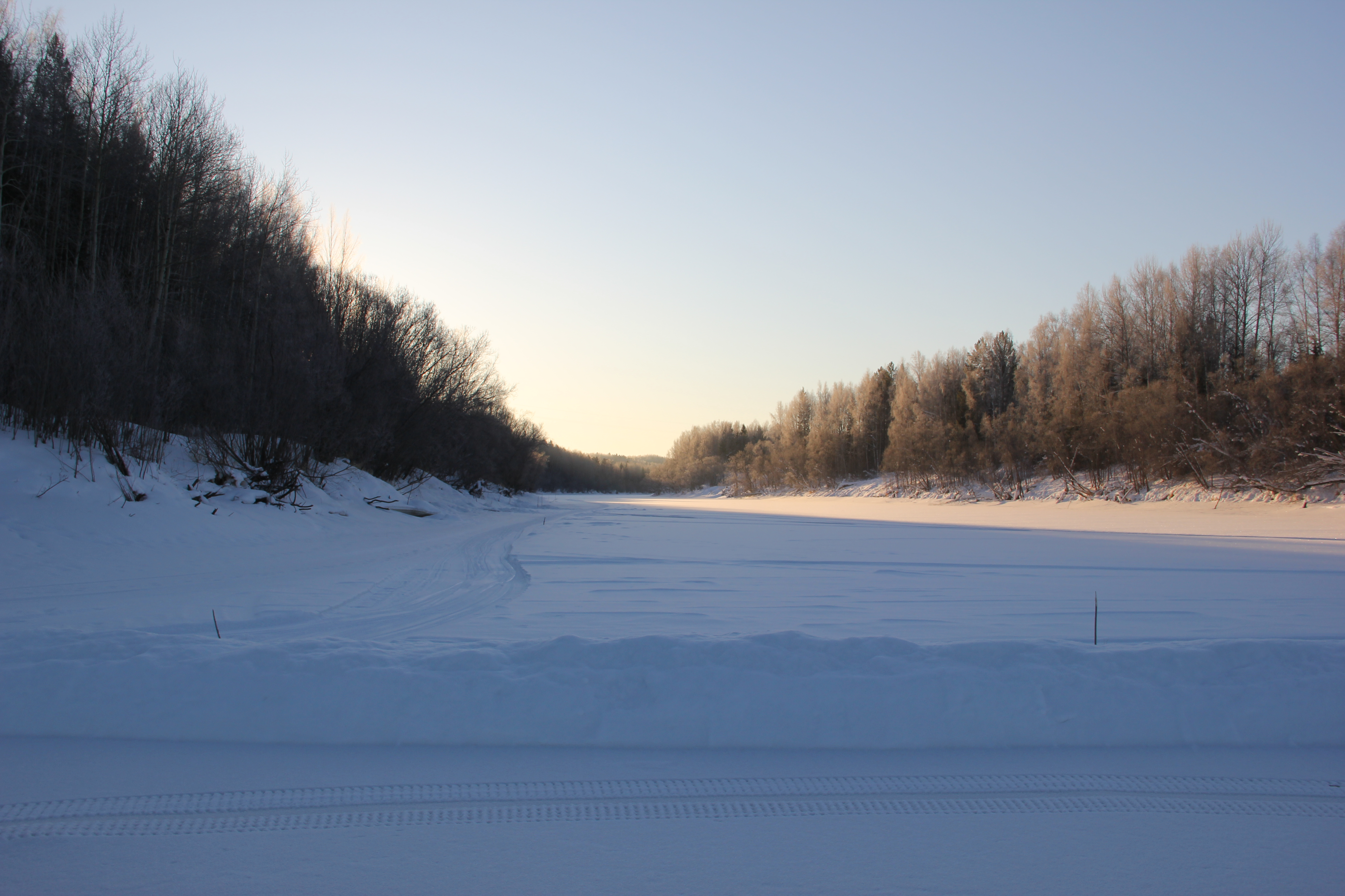 ледовая переправа р.Парабель